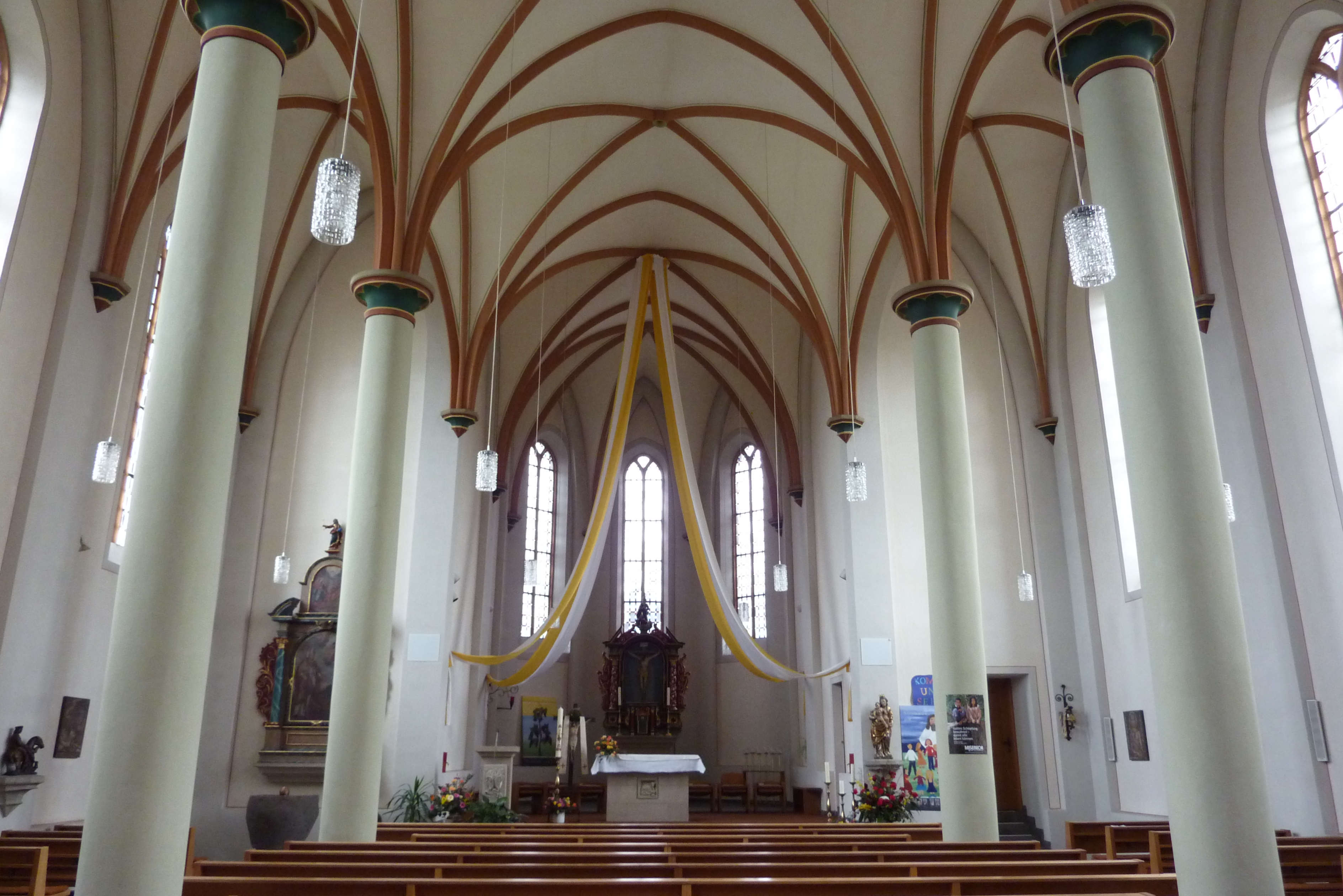 Innenansicht der Kirche St. Georg in Löhndorf, Stadtteil von Sinzig